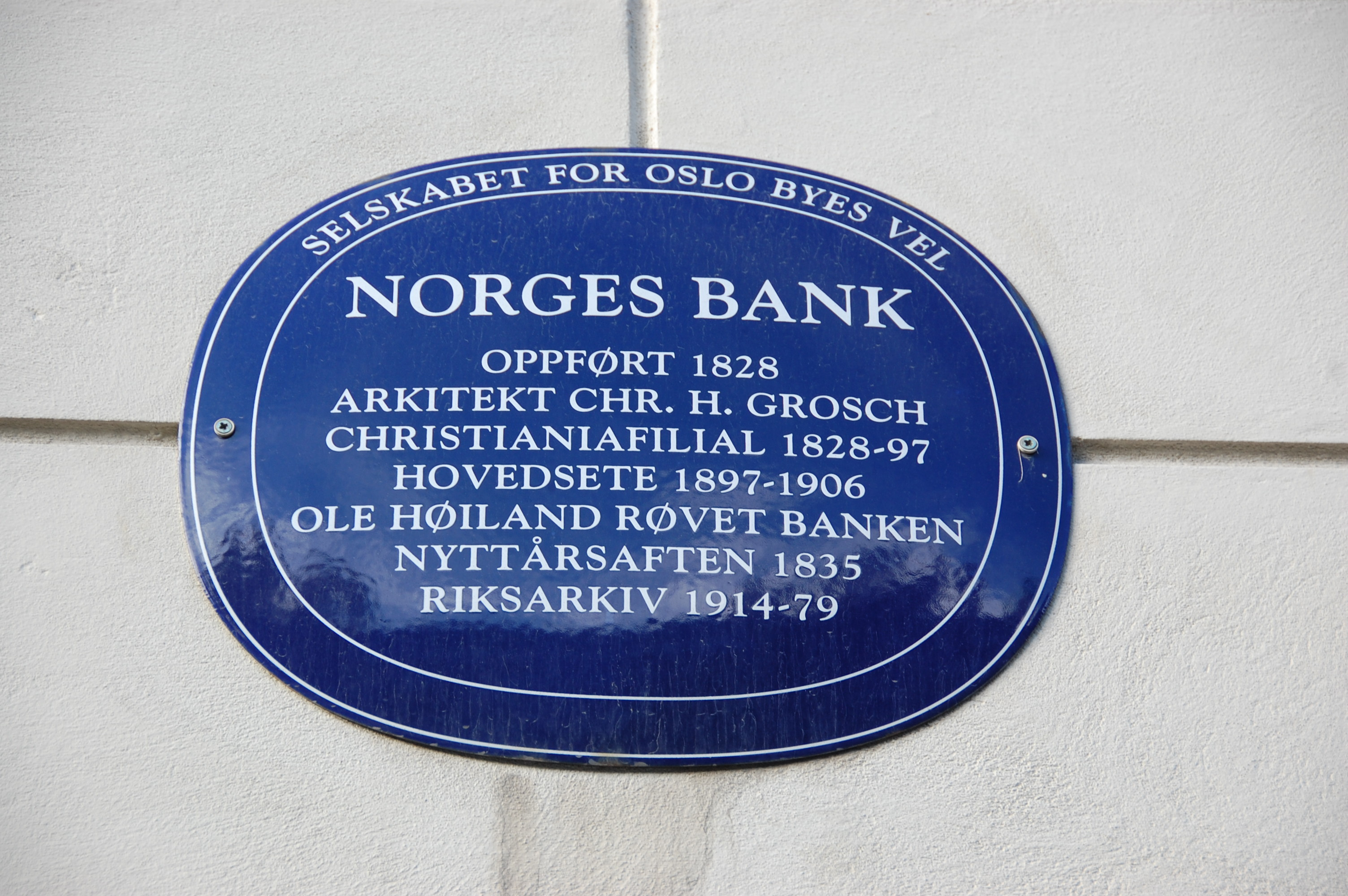 Norges Bank Arkitekturmuseet Kulturhistorisk skilt